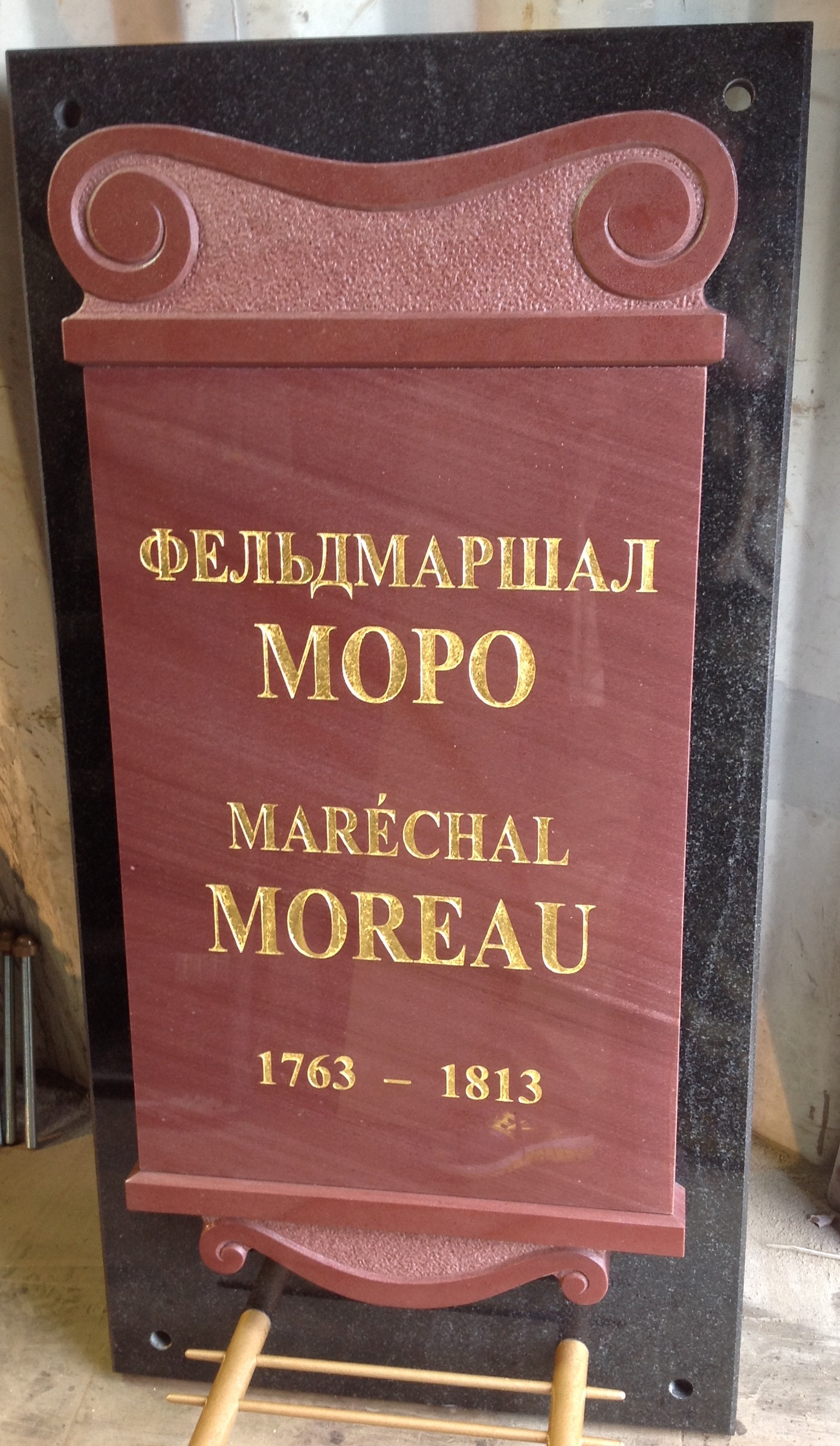 Мемориальная доска для гробницы фельдмаршала Моро в костёле Св. Екатерины Александрийской в Санкт-Петербурге. Передана костёлу 13 июля 2017 года генеральным консулом Франции.